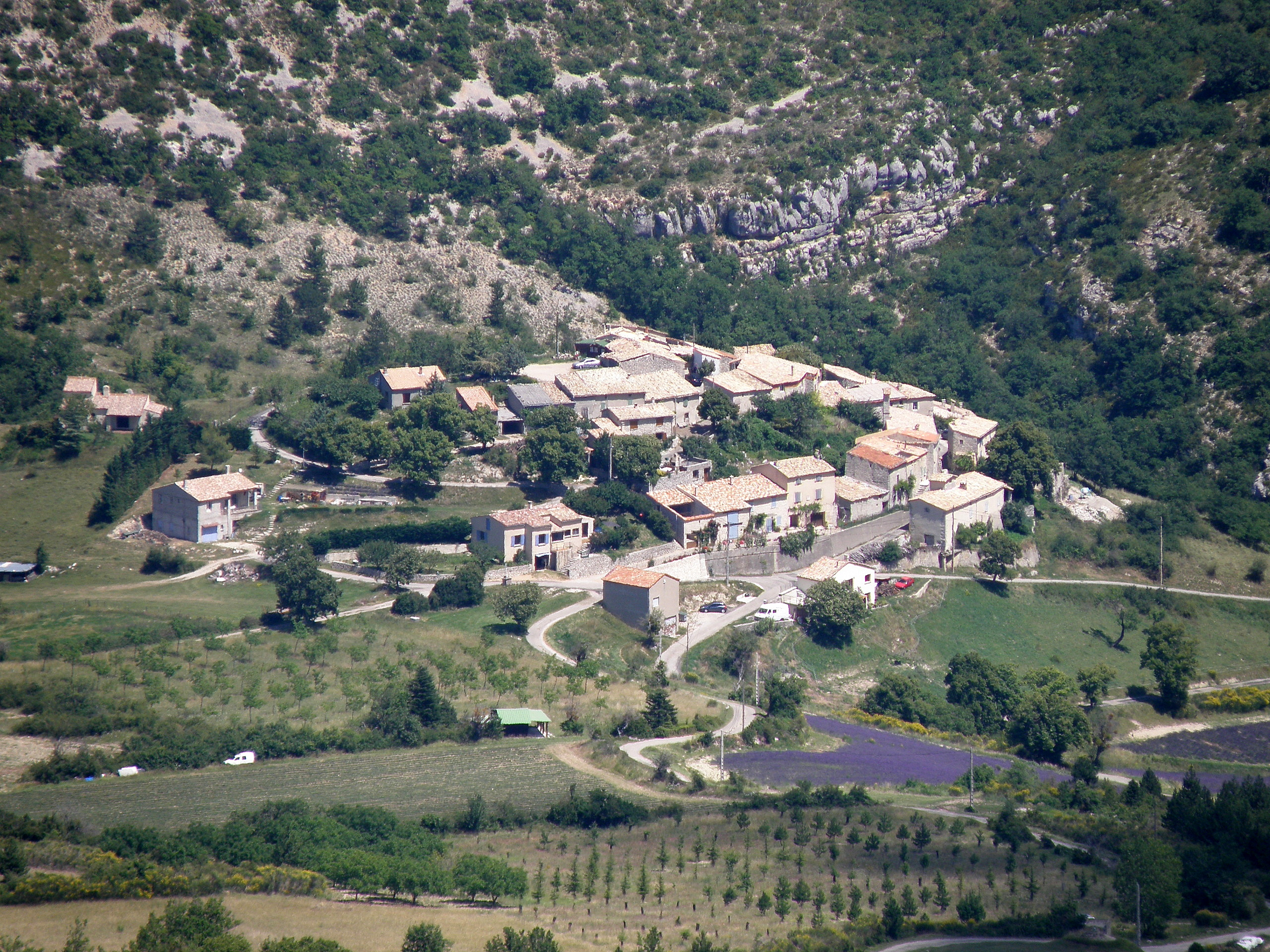 La Rochette-du-Buis (comm. de la Drôme, France). Vue générale prise du sommet de la montagne de la Loube, située dans le sud-ouest de la commune (et dont la ligne de crête forme la limite entre les communes de la Rochette-du-Buis et du Poët-en-Percip). Regard vers l'est-nord-est. On distingue au milieu de la localité le campenard de l'église paroissiale Sainte-Anne.